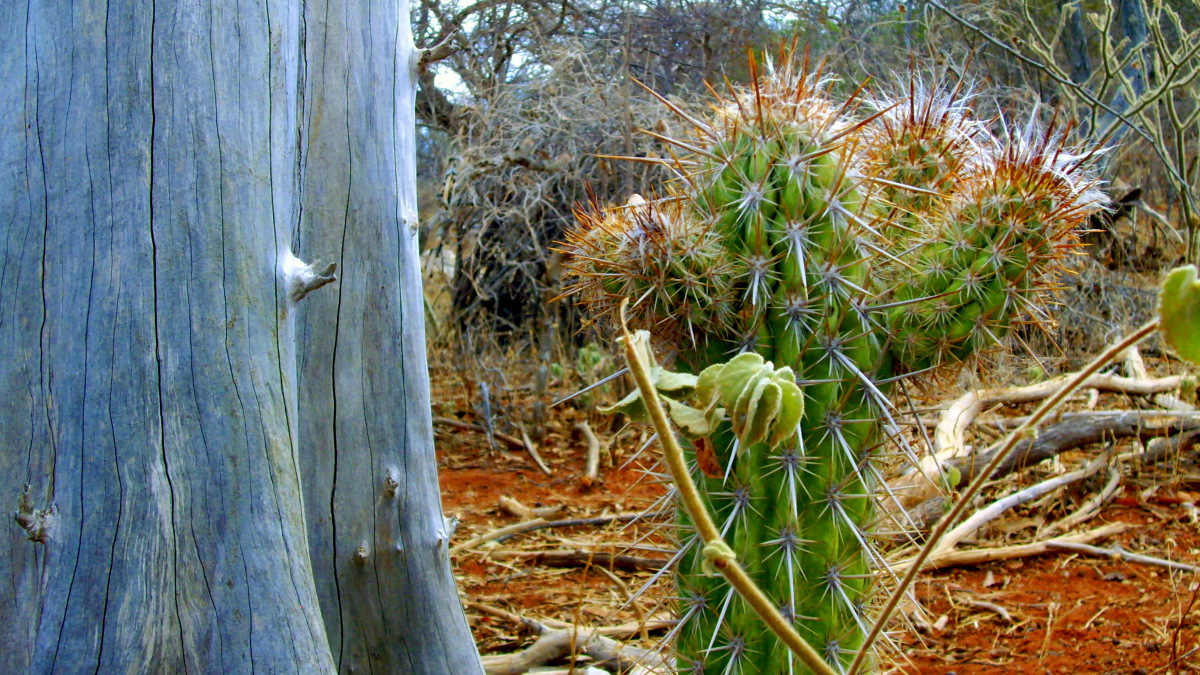 Vegetação típica da caatinga na região do Alto Vale da Bacia do Parnaíba, município de Dirceu Arcoverde.